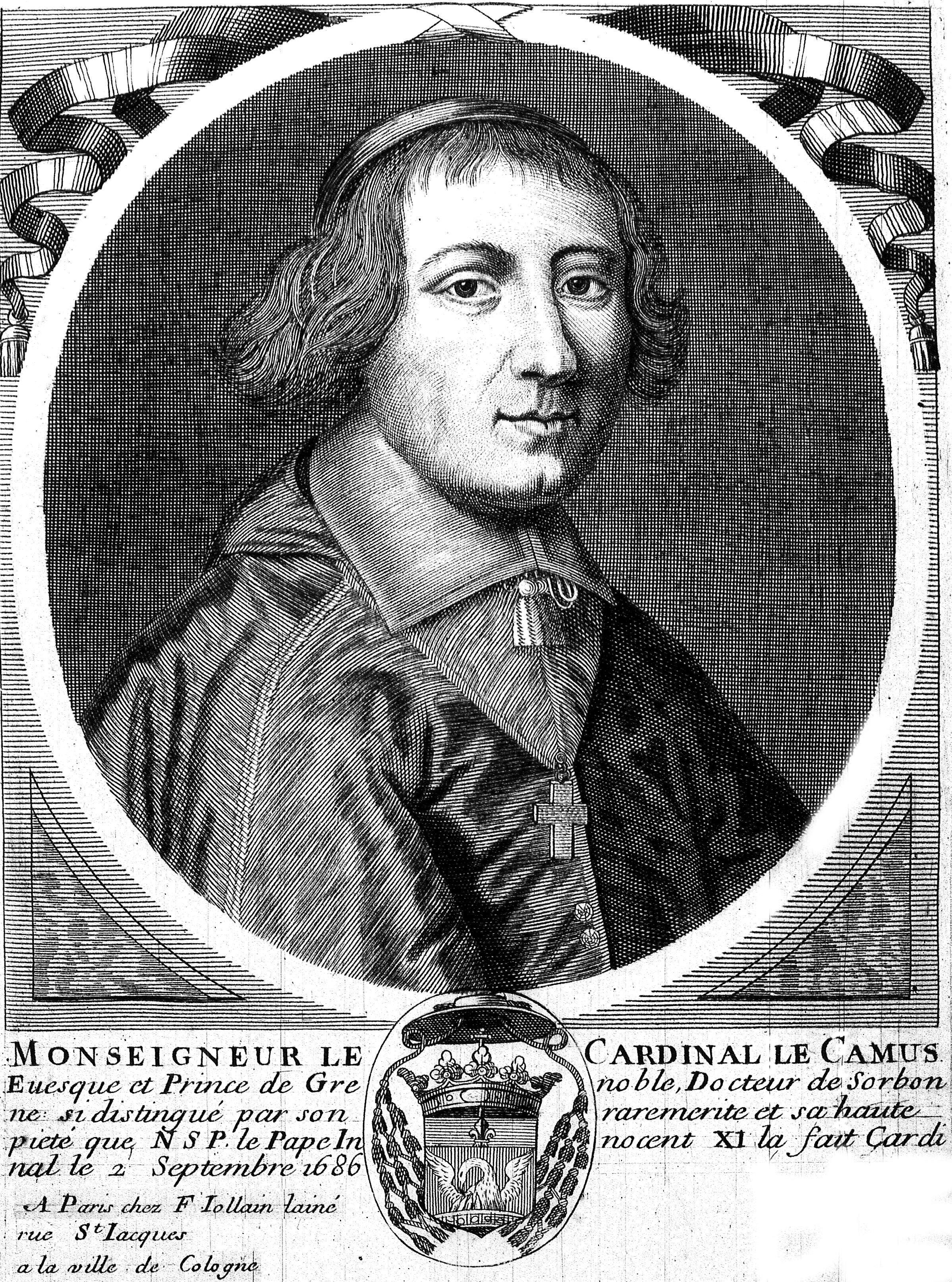 issu du fond iconographique de la bibliothèque de reims.